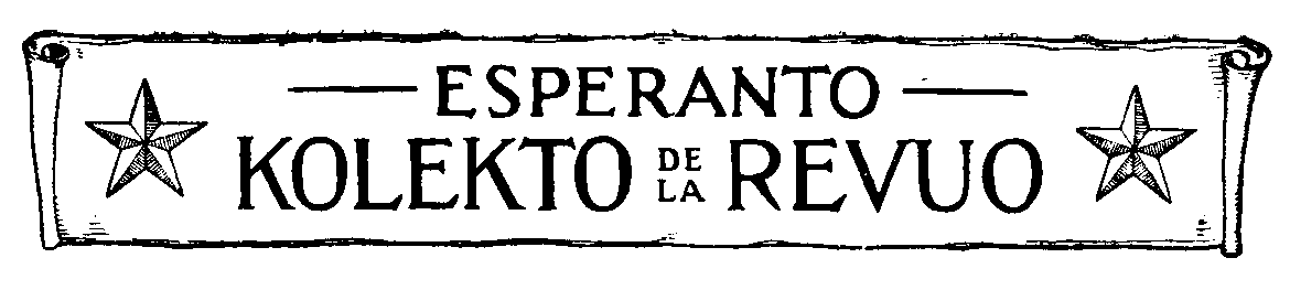 Emblemo de la Kolekto de la Revuo